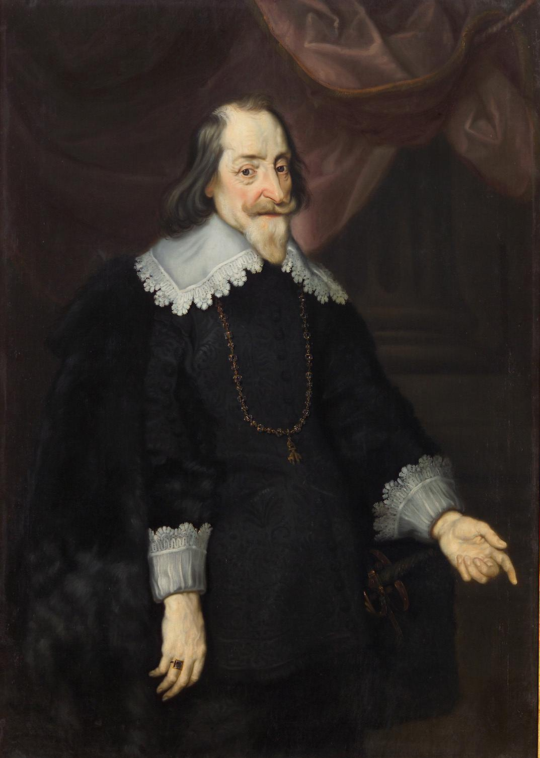 Ein sog. 'Kniestück' war günstiger im Preis, daher wurde hier König Maximilian I. als Dreiviertelfigur abgebildet, im Unterschied zum Gemälde der Alten Pinakothek, München.